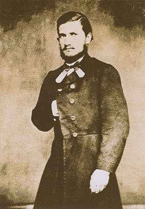 Argentinian artist Cándido López in uniform